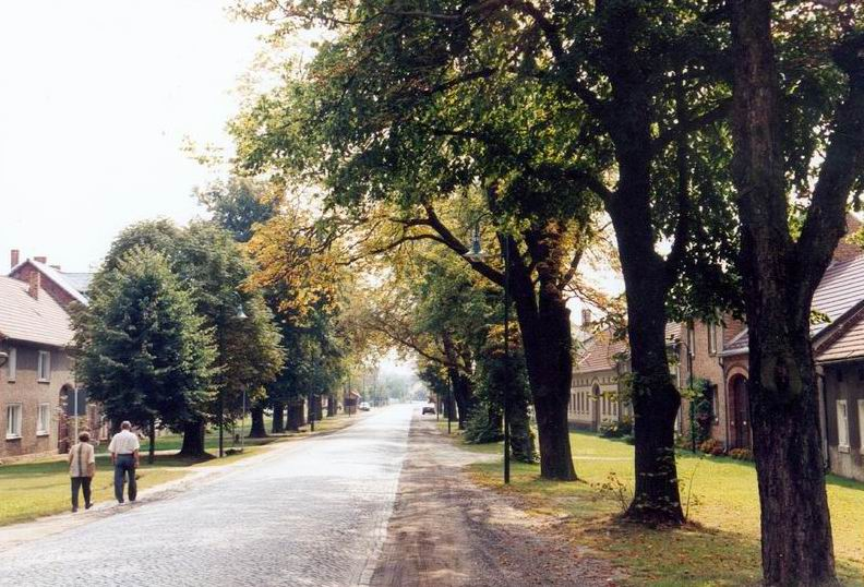 Aufnahme zeigt das brandenburgisches Angerdorf Lichterfeld.